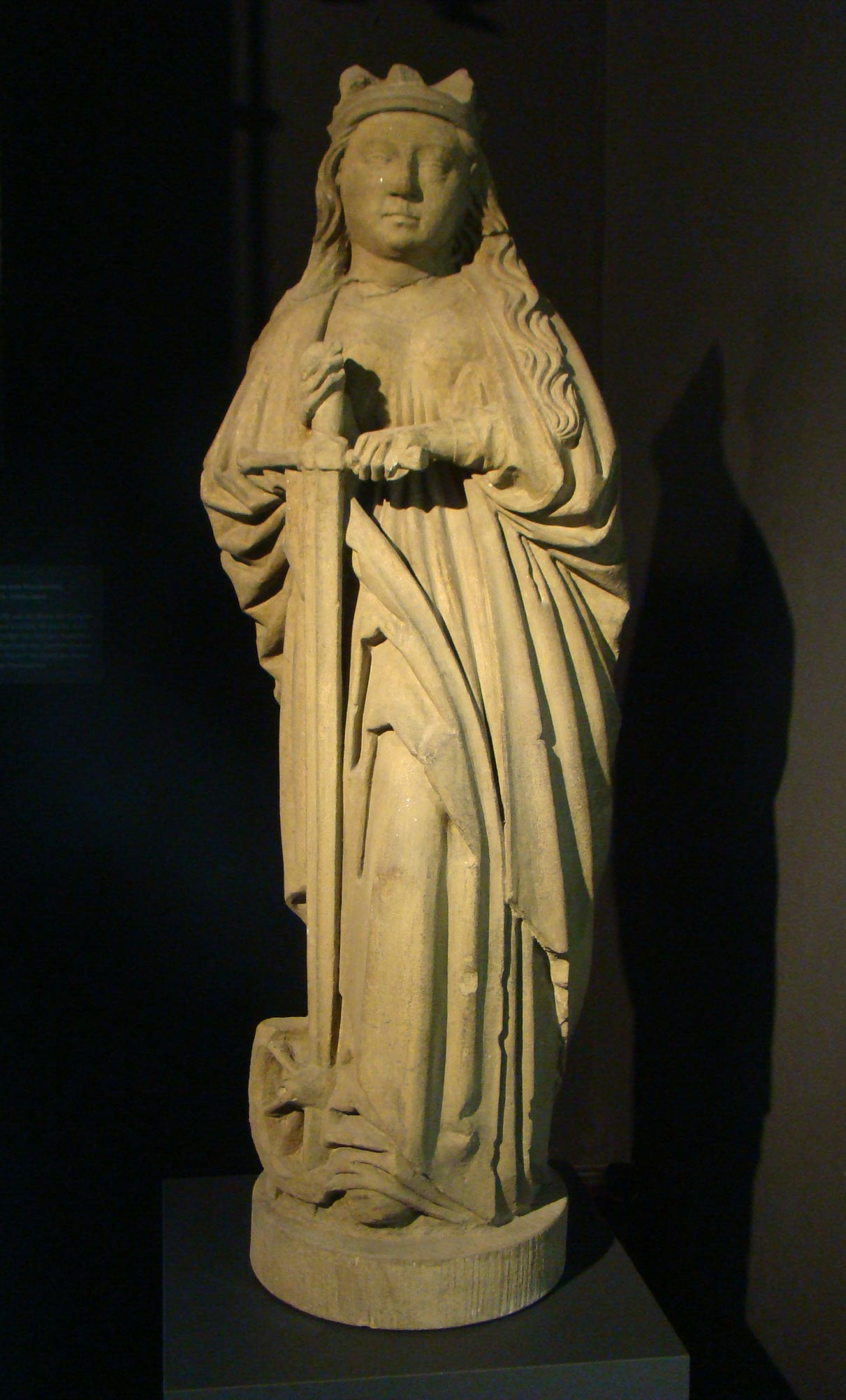 Historische Katharinenfigur im Haus der Stadtgeschichte Heilbronn